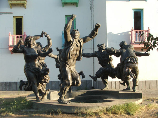 sculpture